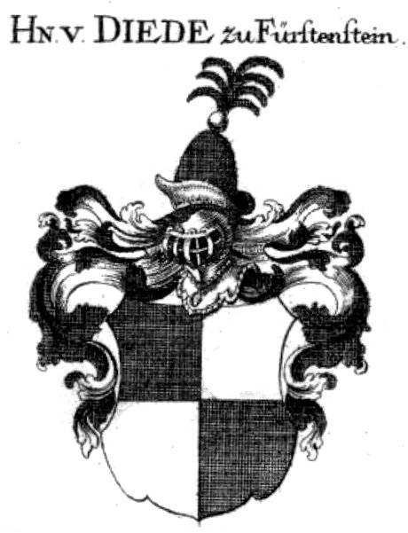 Wappen der Familie Diede zum Fürstenstein (1780)